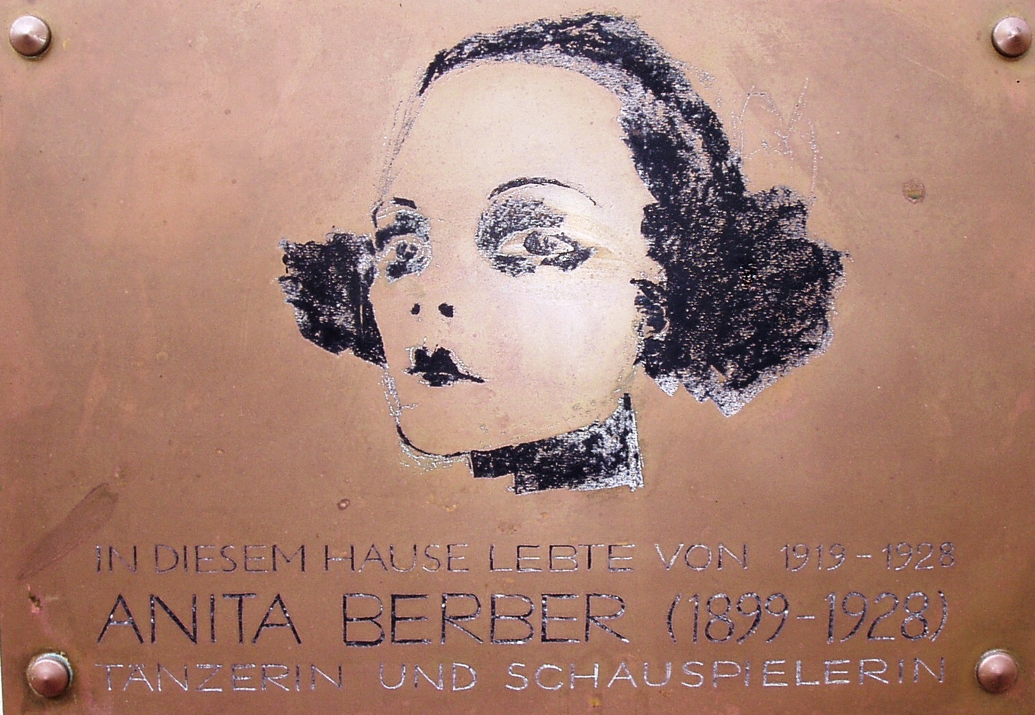 Gedenktafel 10707 Berlin-Wilmersdorf, Zähringerstraße 13. Wohnung der Tänzerin Anita Berber